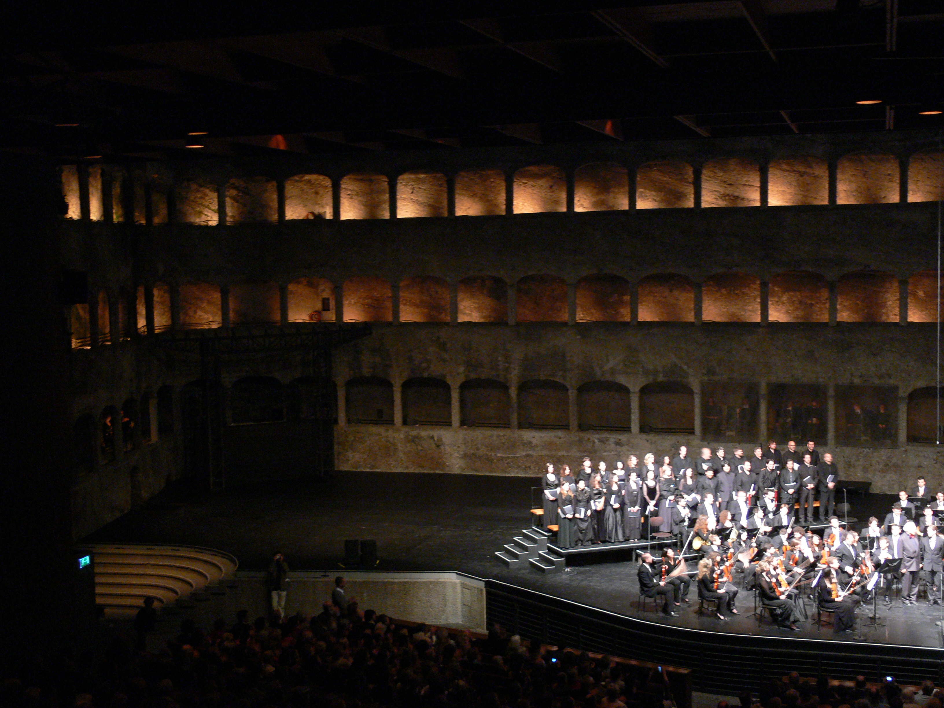 Salzburg, Felsenreitschule